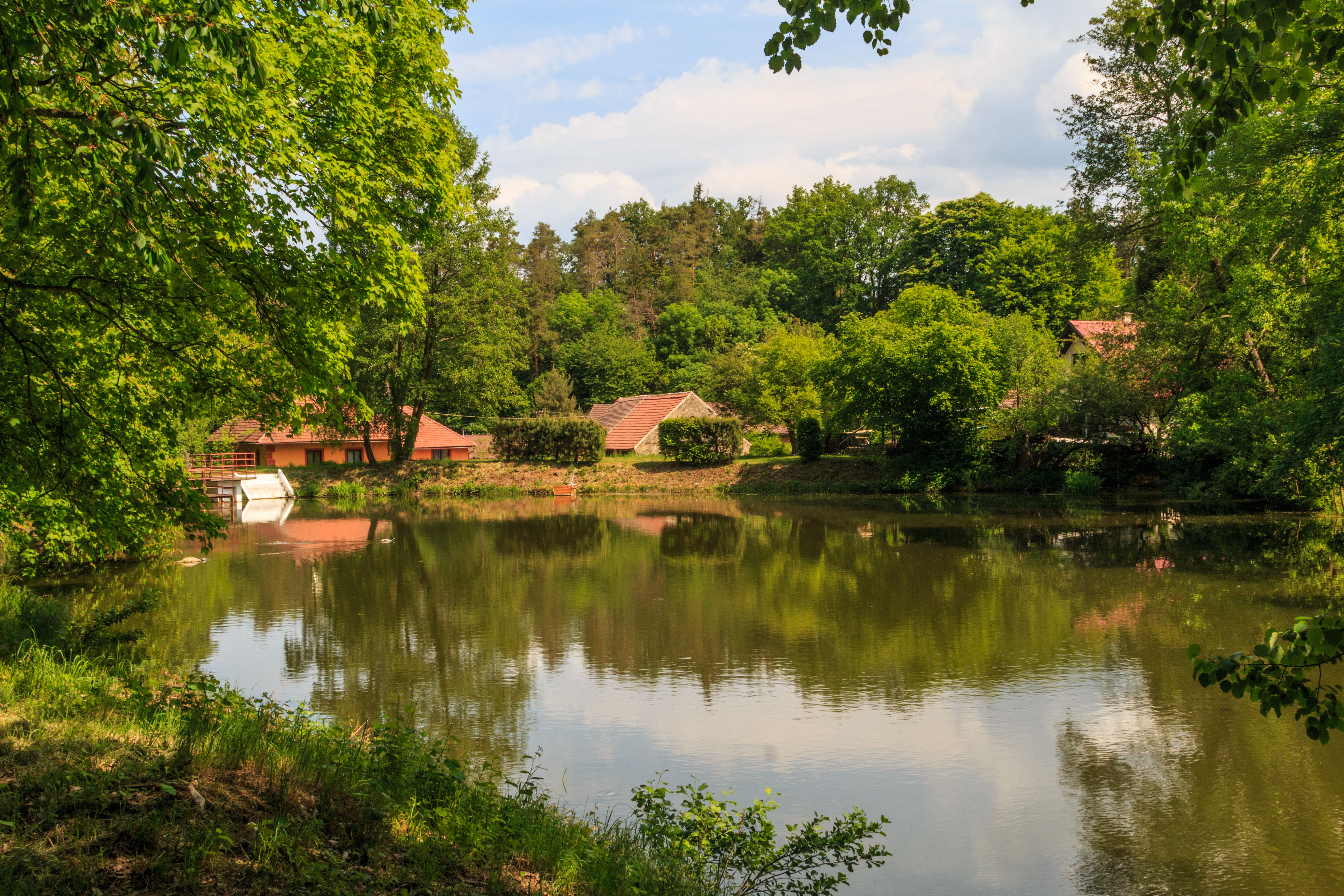 Mlýnský rybník v Seníku Mediagrant 2018|Vodstvo